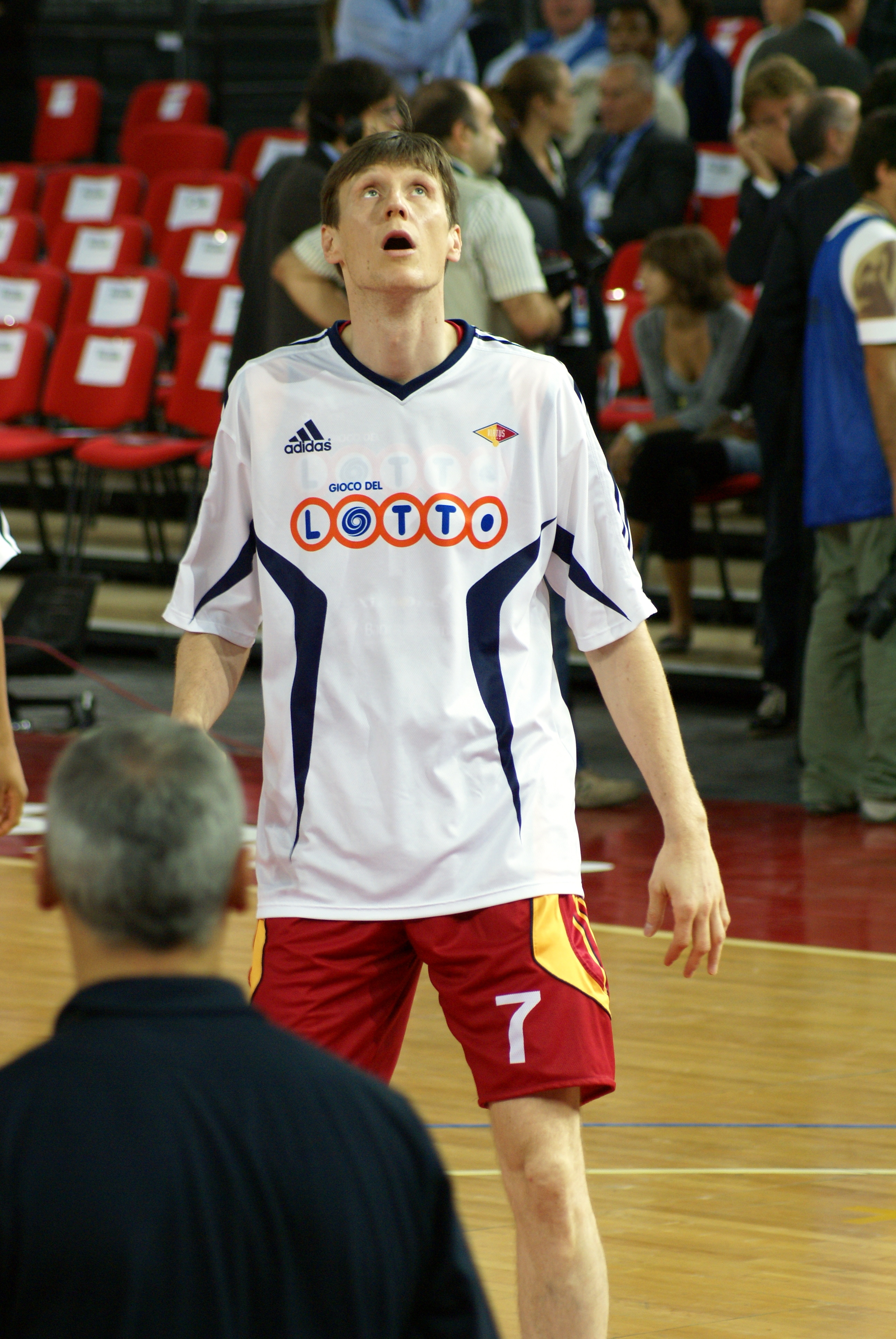 Gregor Fucka